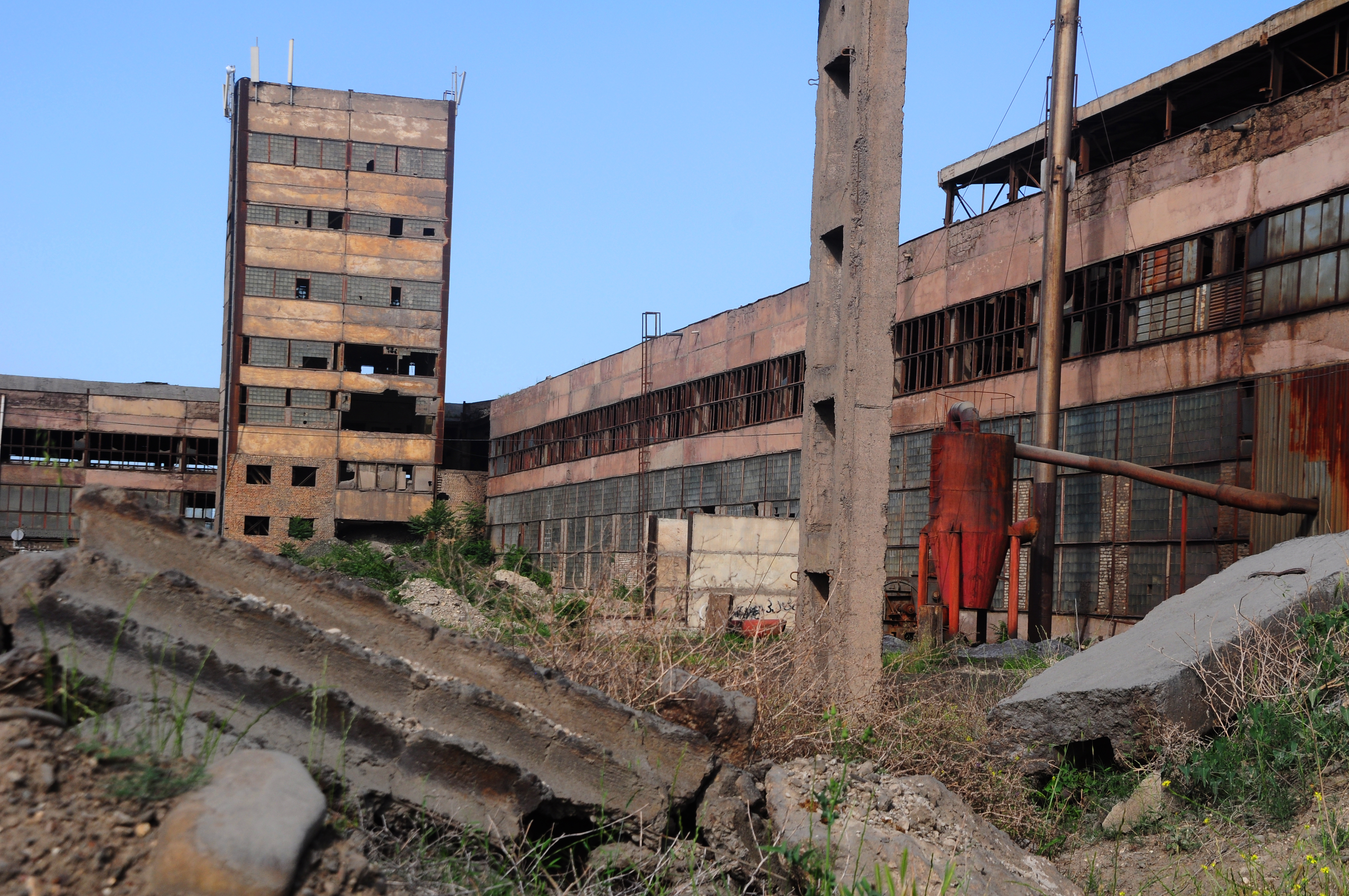 17668 Rustavi